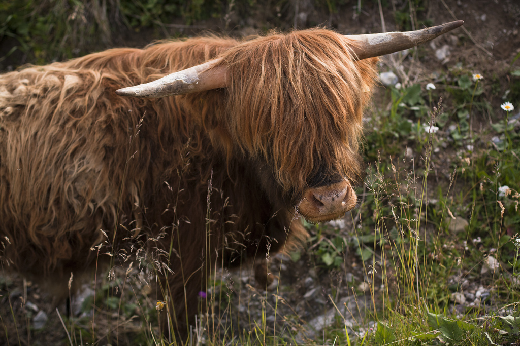 Razza bovina dal pelo lungo originaria della Scozia, foto scattata a un esemplare nei pressi di Pampeago